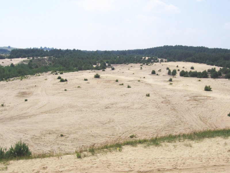 Widok na pustynię Siedlecką. Zdjęcie wykonano w lipcu 2005. Autor Tomasz Hupa aka freeze